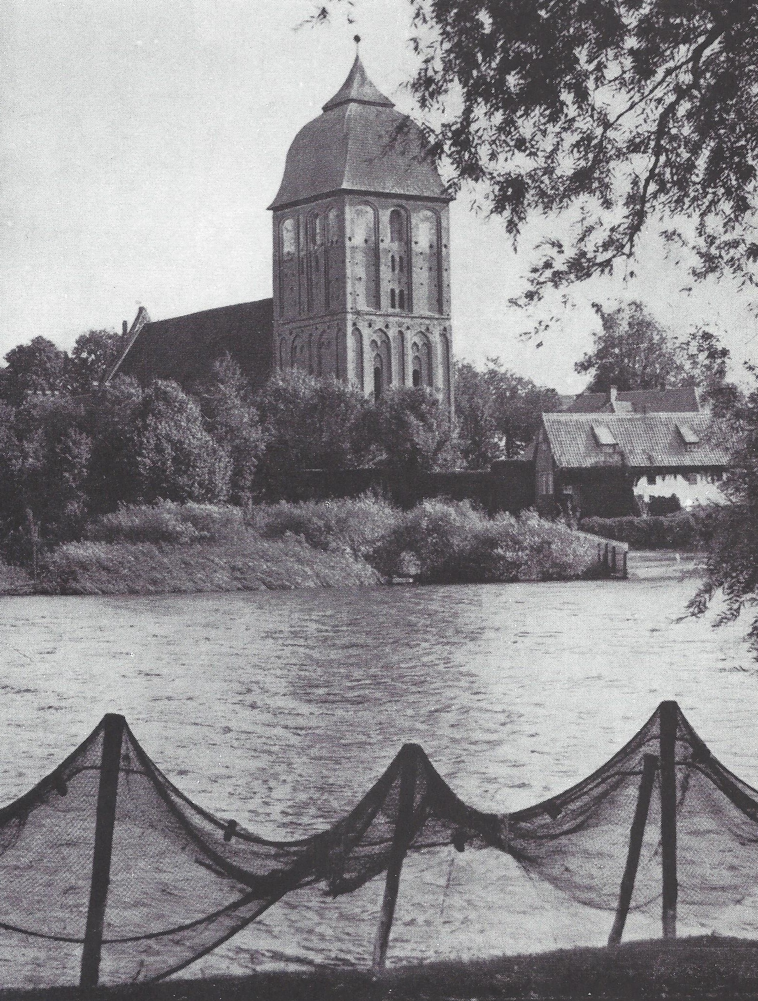 Kornhocken auf dem Schlachtfeld von Tannenberg.